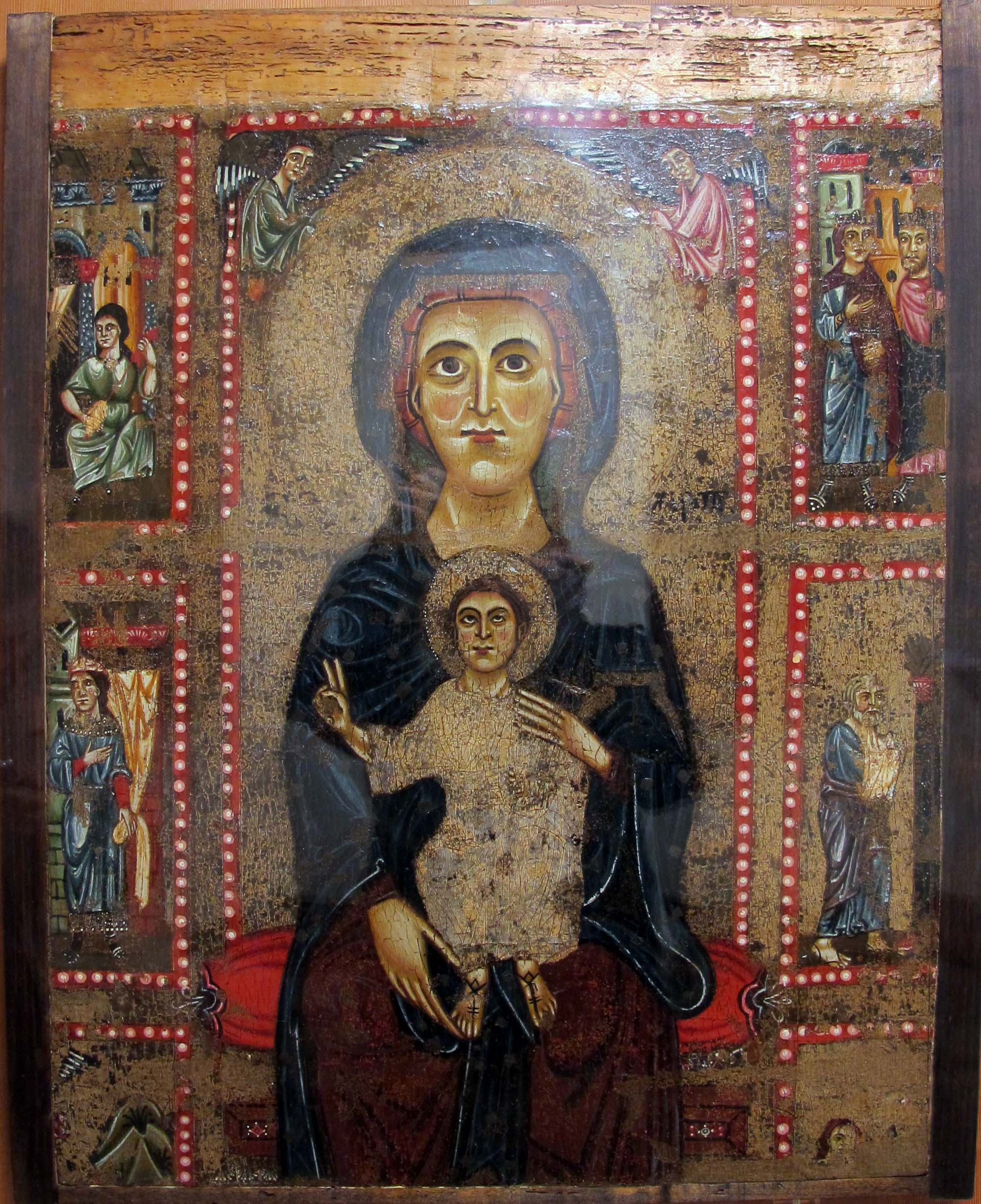 Museo diocesano (Siena)